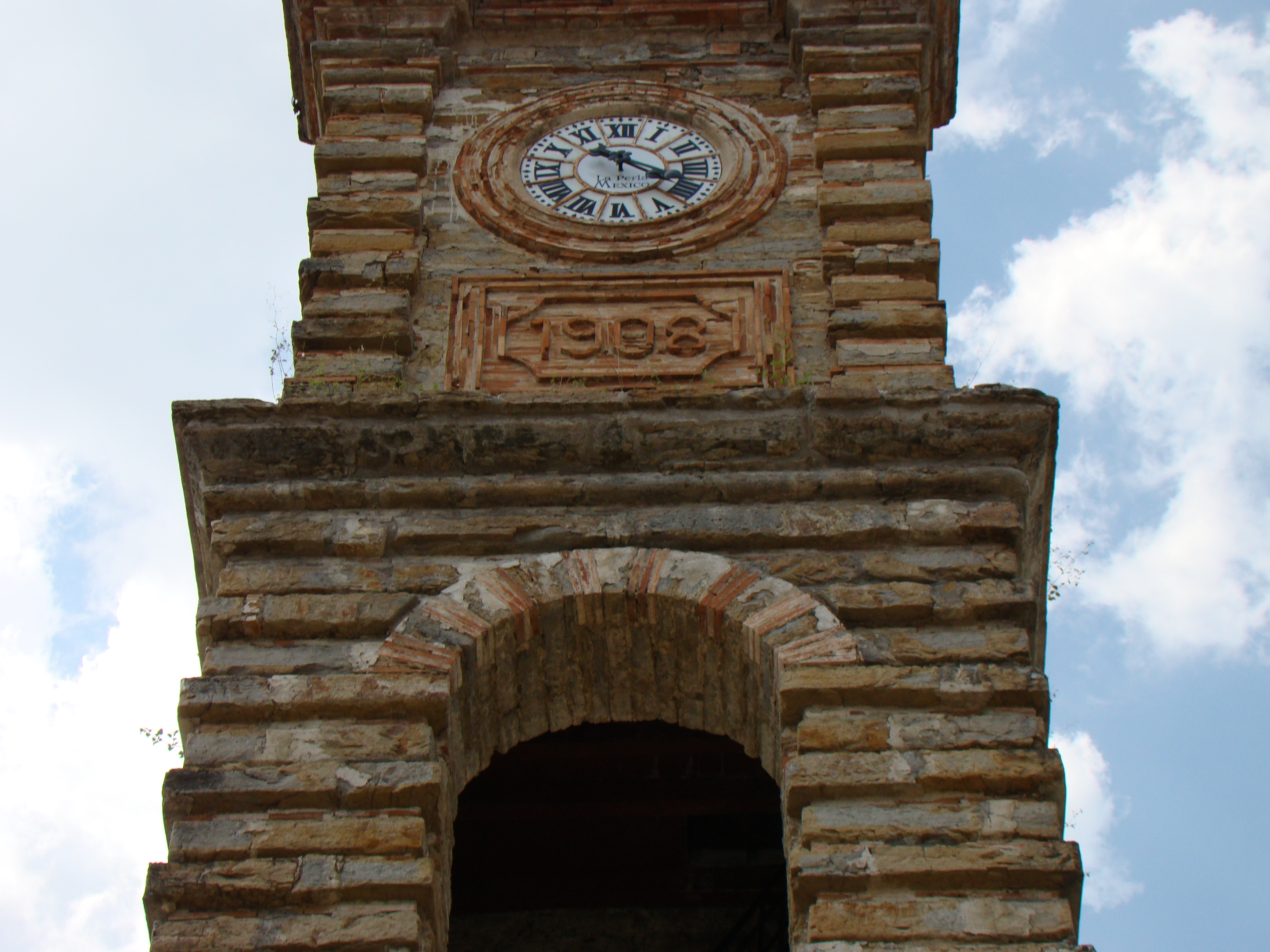 Reloj Plaza Revolucion Huejutla Hidalgo